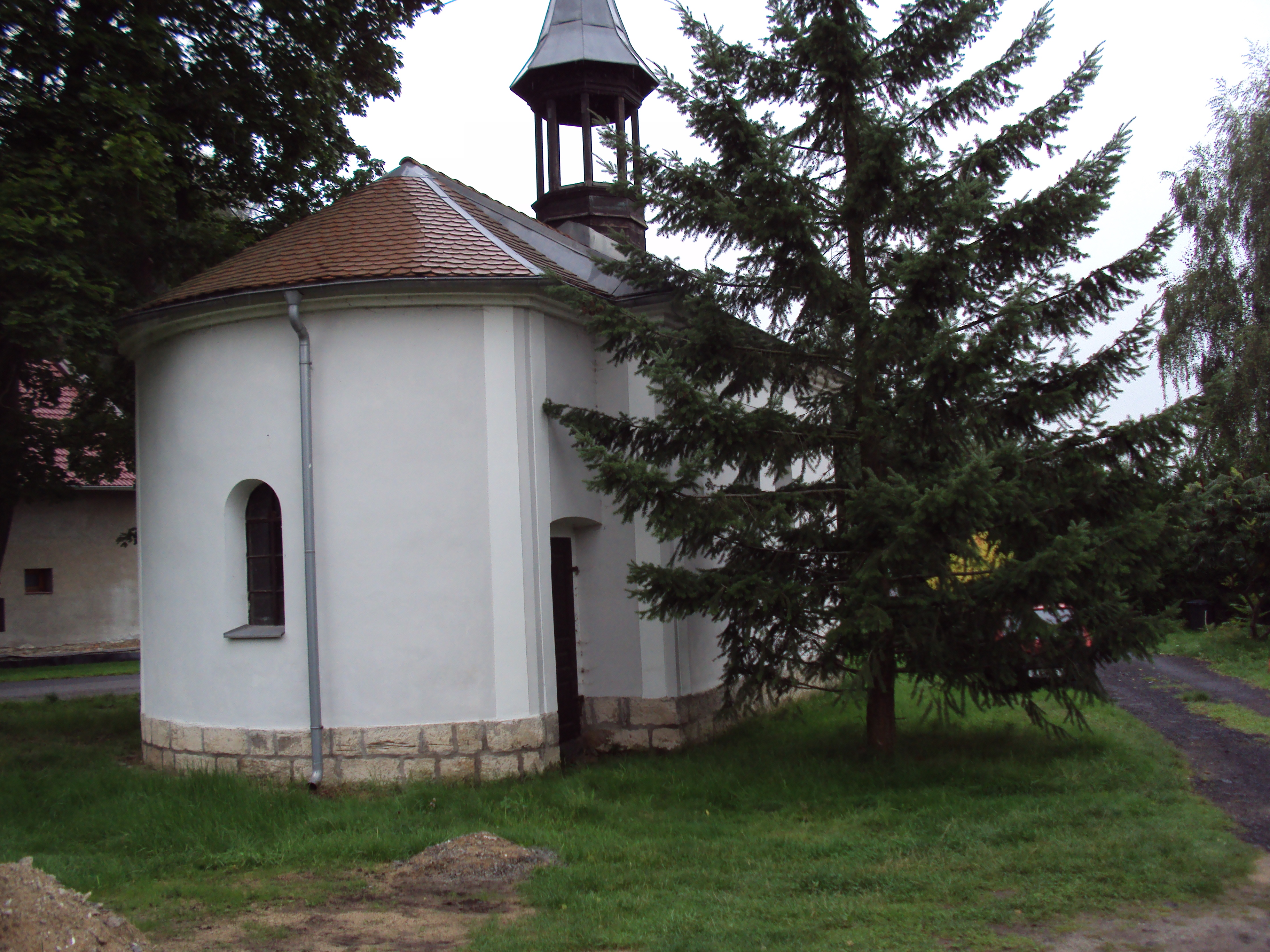 Kaple bez označení uprostřed vsi Okřešice u České Lípy, zezadu